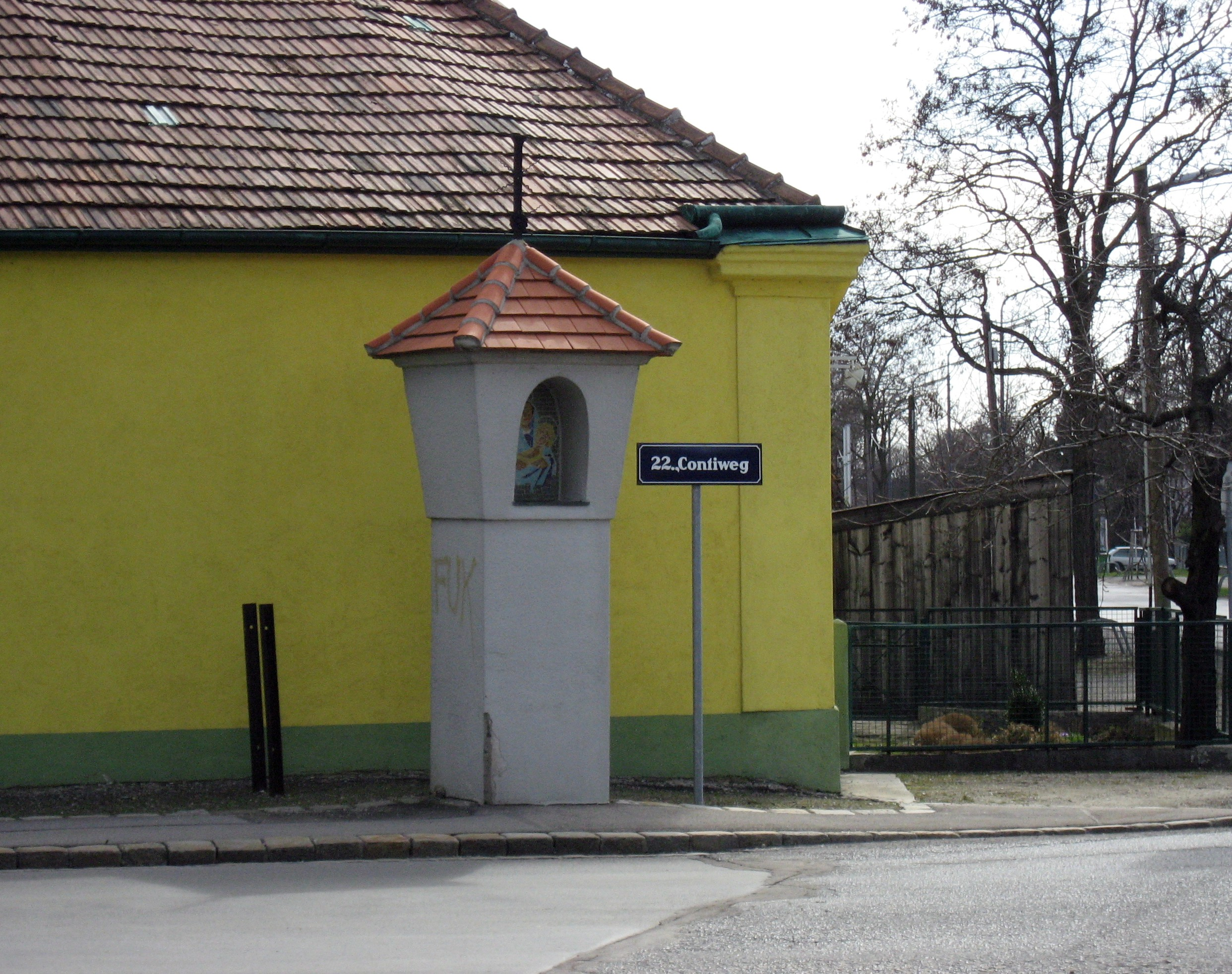 Contiweg in Wien-Donaustadt